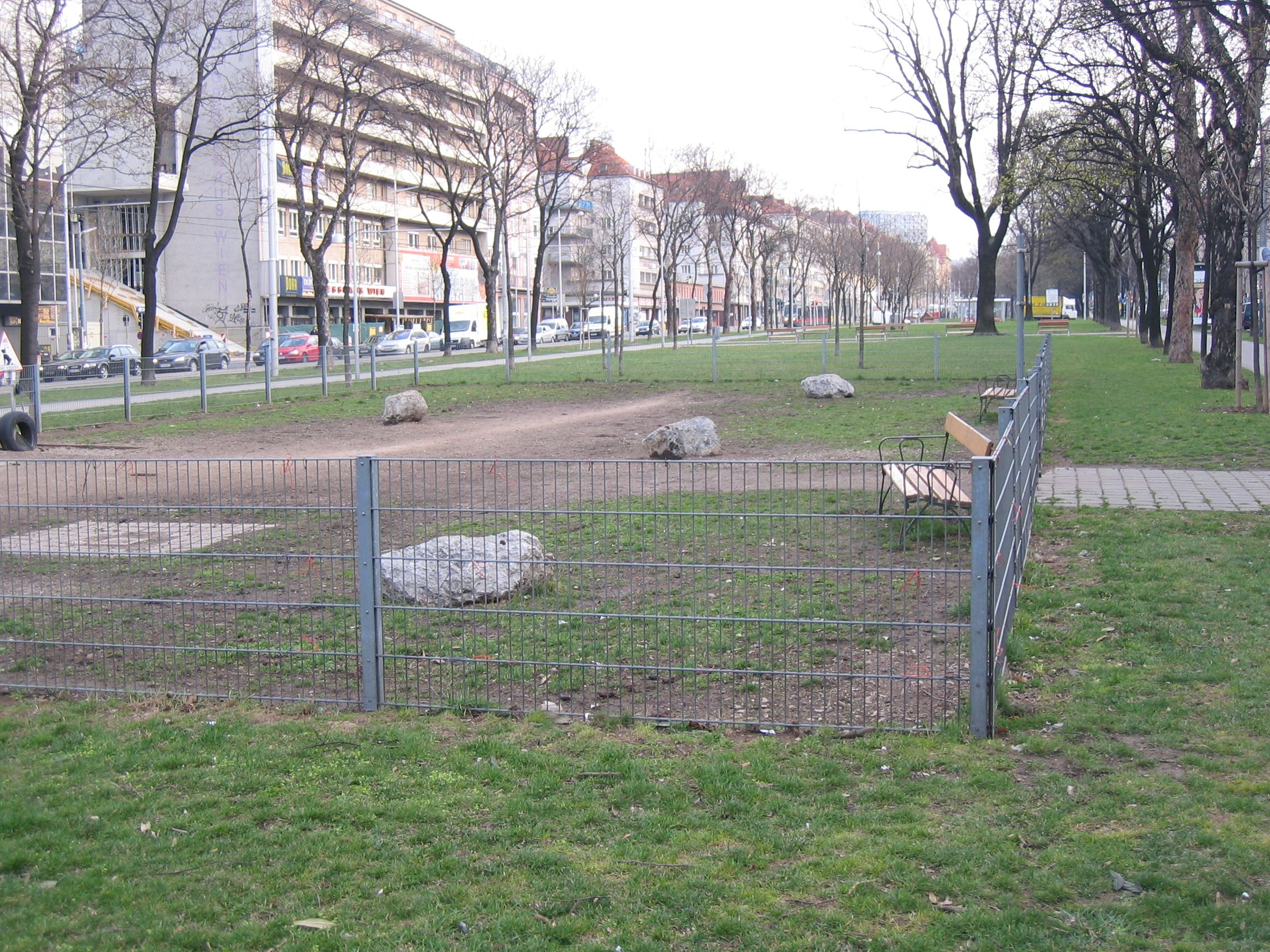 Hundezone am Margaretengürtel - Wien